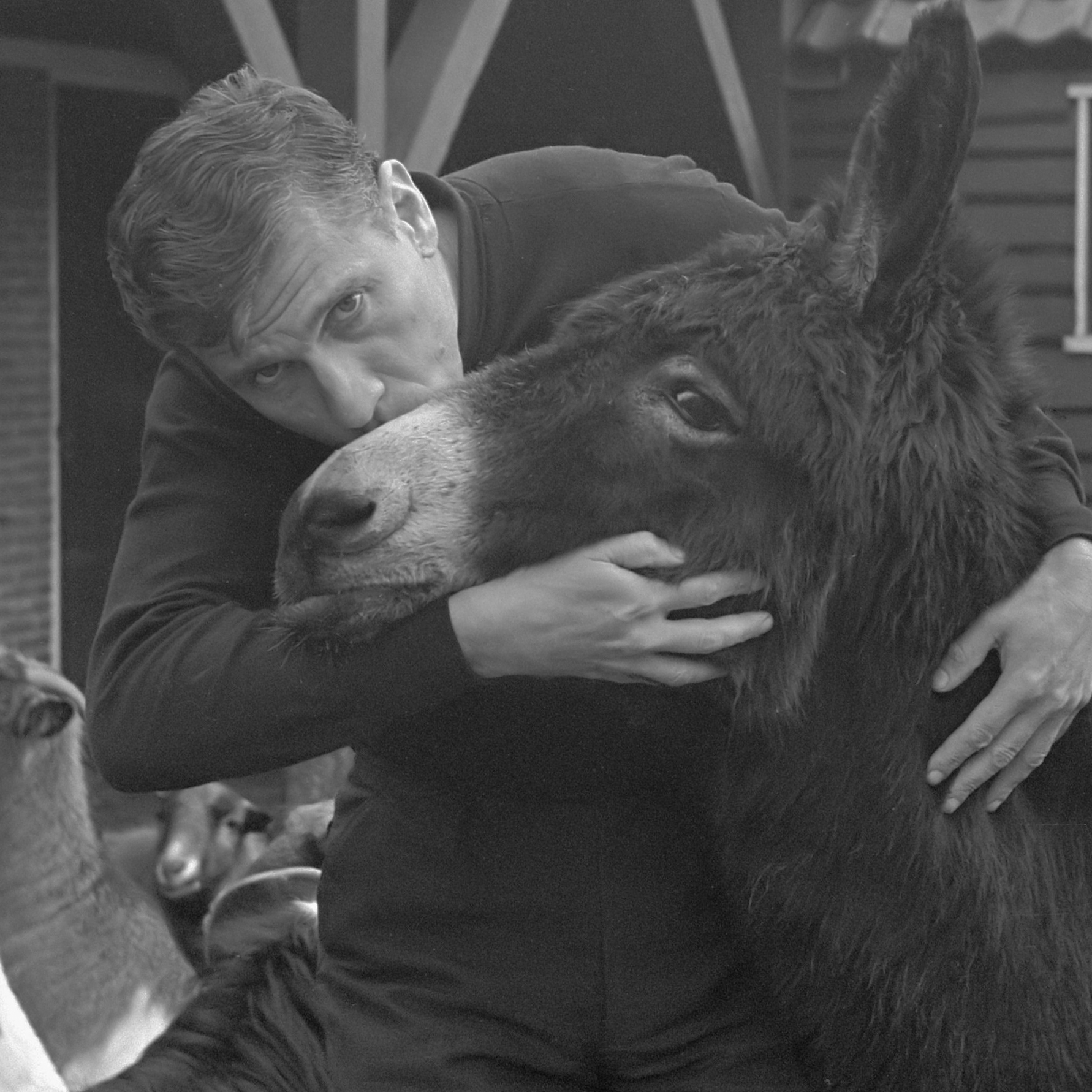 G.K. van het Reve, met ezel 7 januari 1969